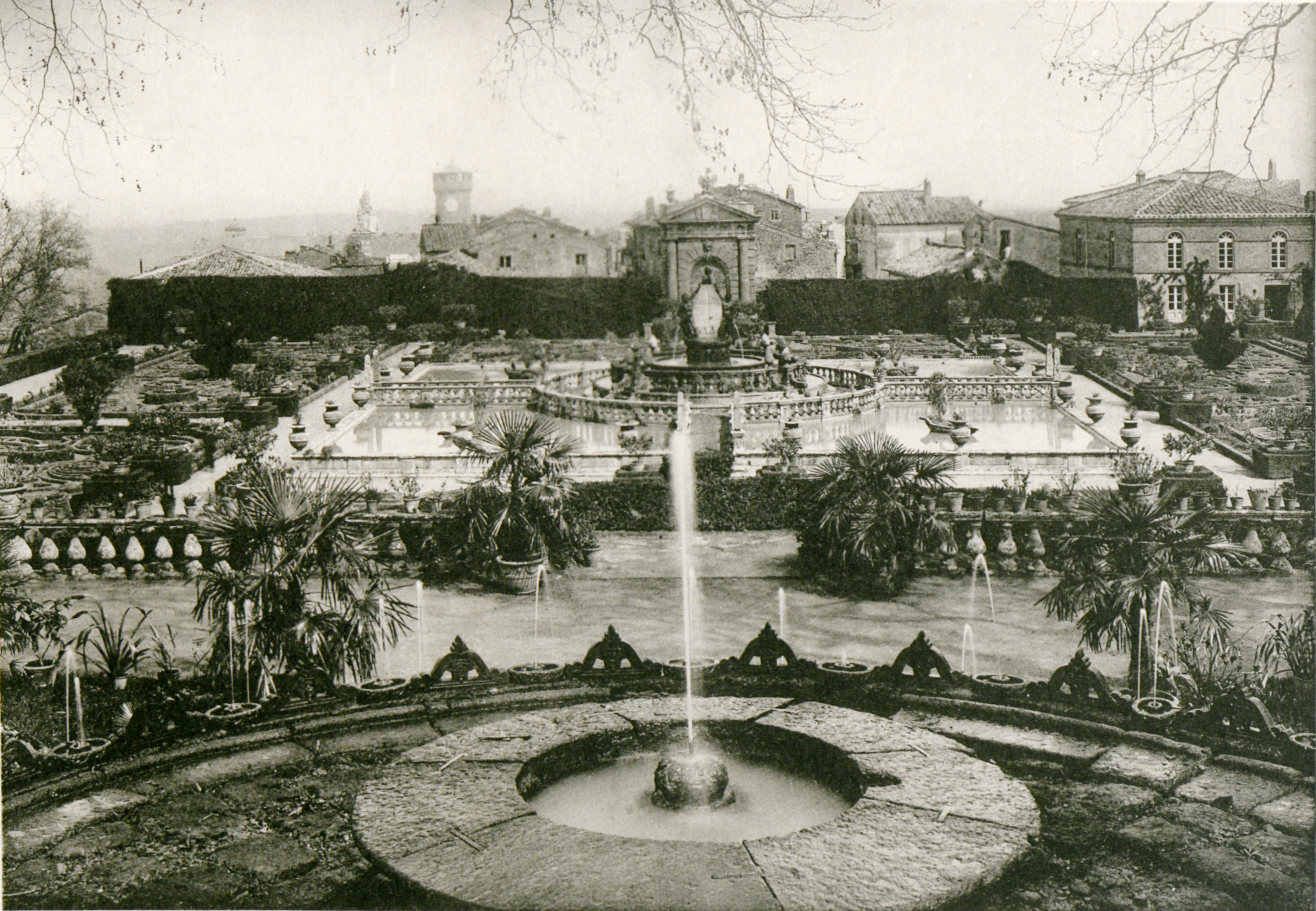 Garden craft in Europe. London 1913. Villa Lante by Aubrey LeBlond.